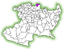 Estado de MIchoacan donde se muestran los limites municipa;es